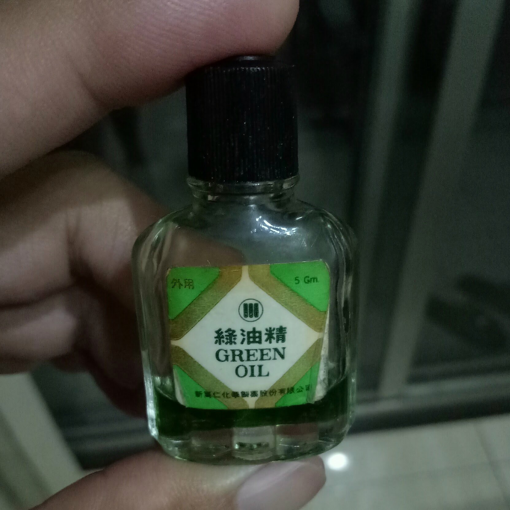 新萬仁化學製藥綠油精5Gm玻璃瓶裝。